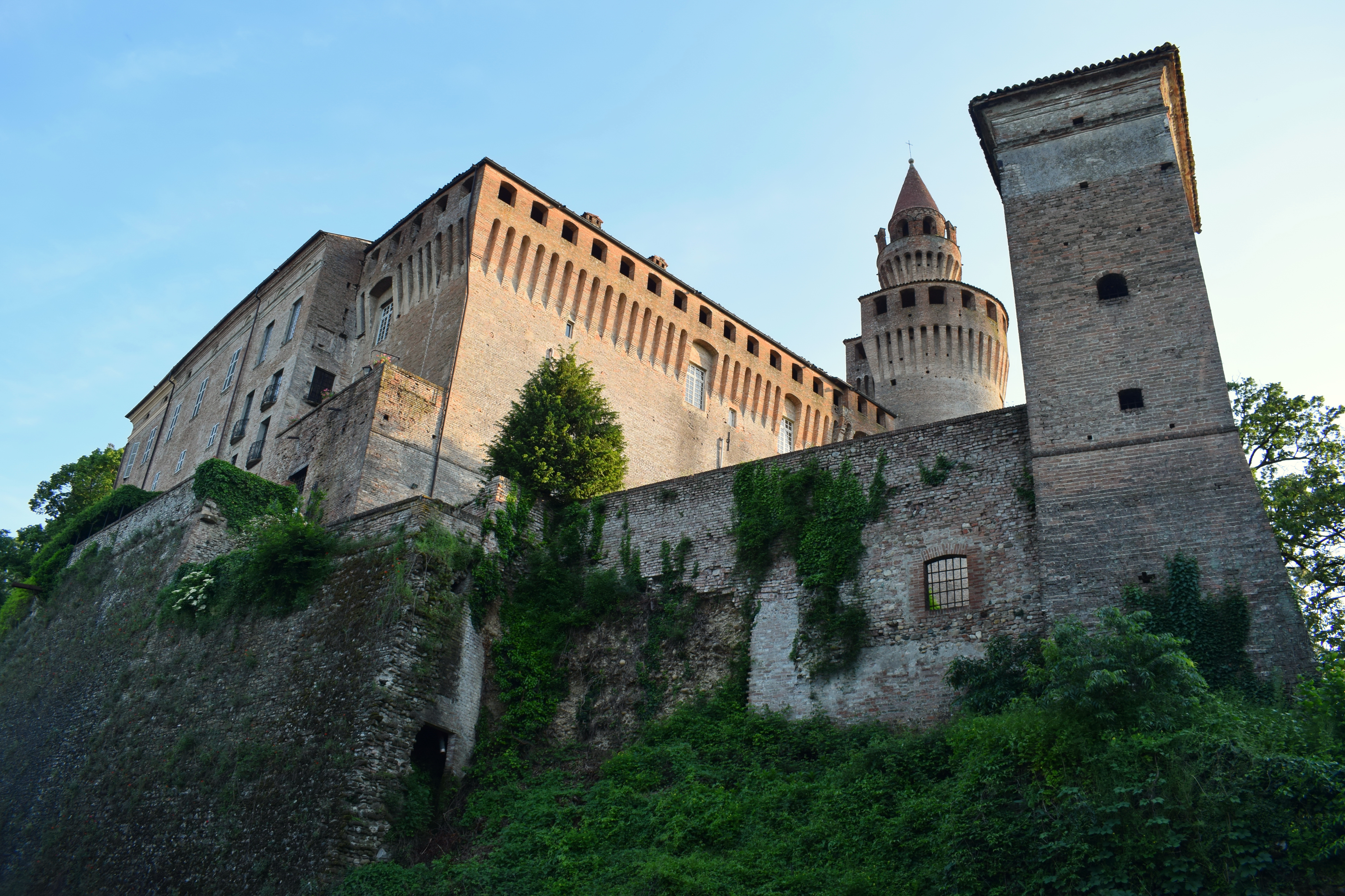 Château de Rivalta, Rivalta Trebbia, Italie